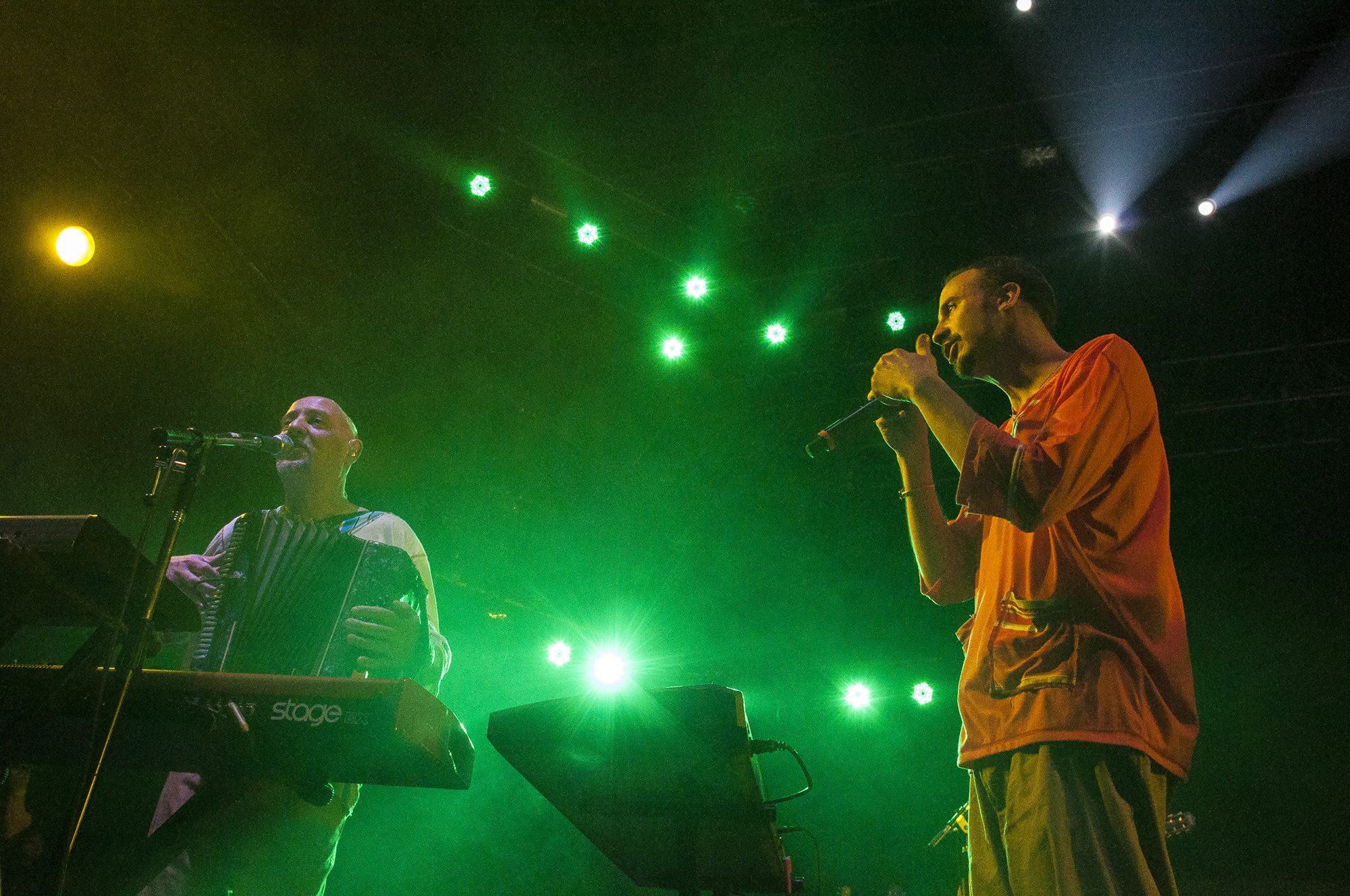 Juan Subirá, tecladista de Bersuit Vergarabat.